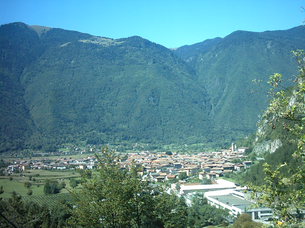 Storo: panorama visto da est (Cit)